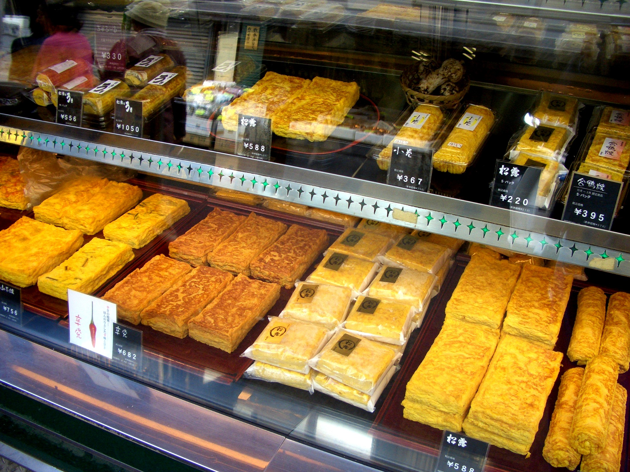 Tamago yaki. Foto scattata da me a Tokyo nei pressi del mercato di Tsukiji il 31.10.06.